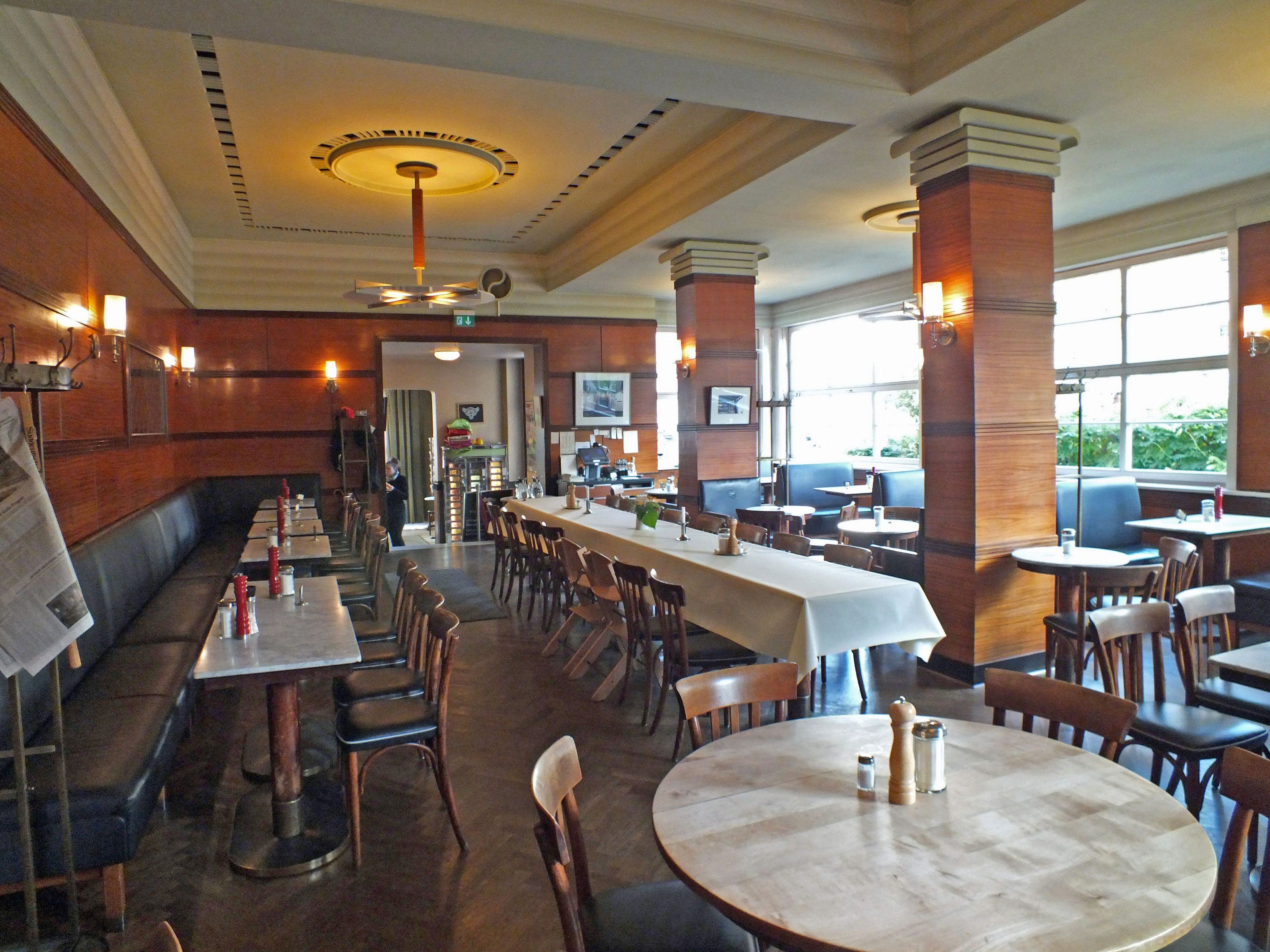 Inneneinrichtung des Café Grundmann in Leipzig